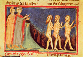 manuscritto Palatino 313, f.47r